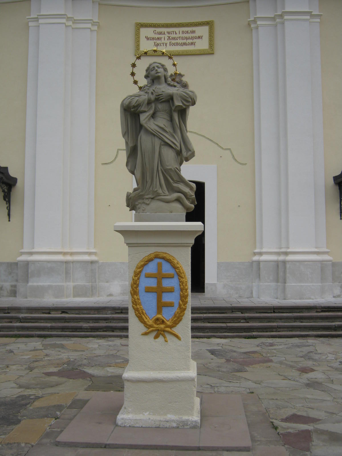 Статуя Діви Марії (тераса монастиря оо. Василіян, Бучач)